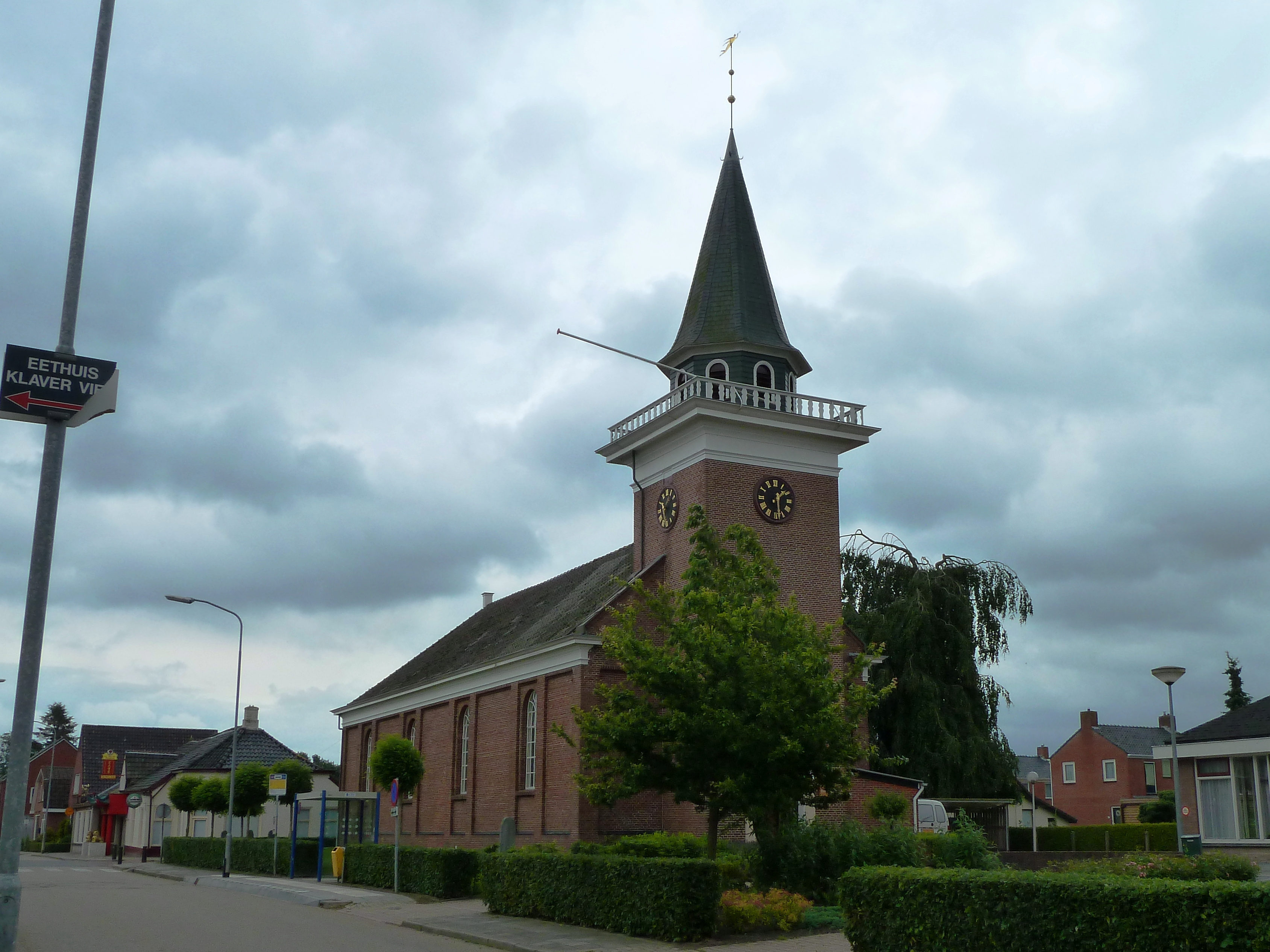 Hervormde kerk van Wagenborgen (Delfzijl, Groningen, Nederland).